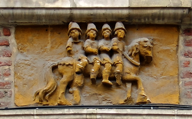 Plaque représentant les 4 fils Aymon sur Bayard sur l'ancien estaminet aux 4 Frères Aymon rue de la Barre à Lille (Nord).